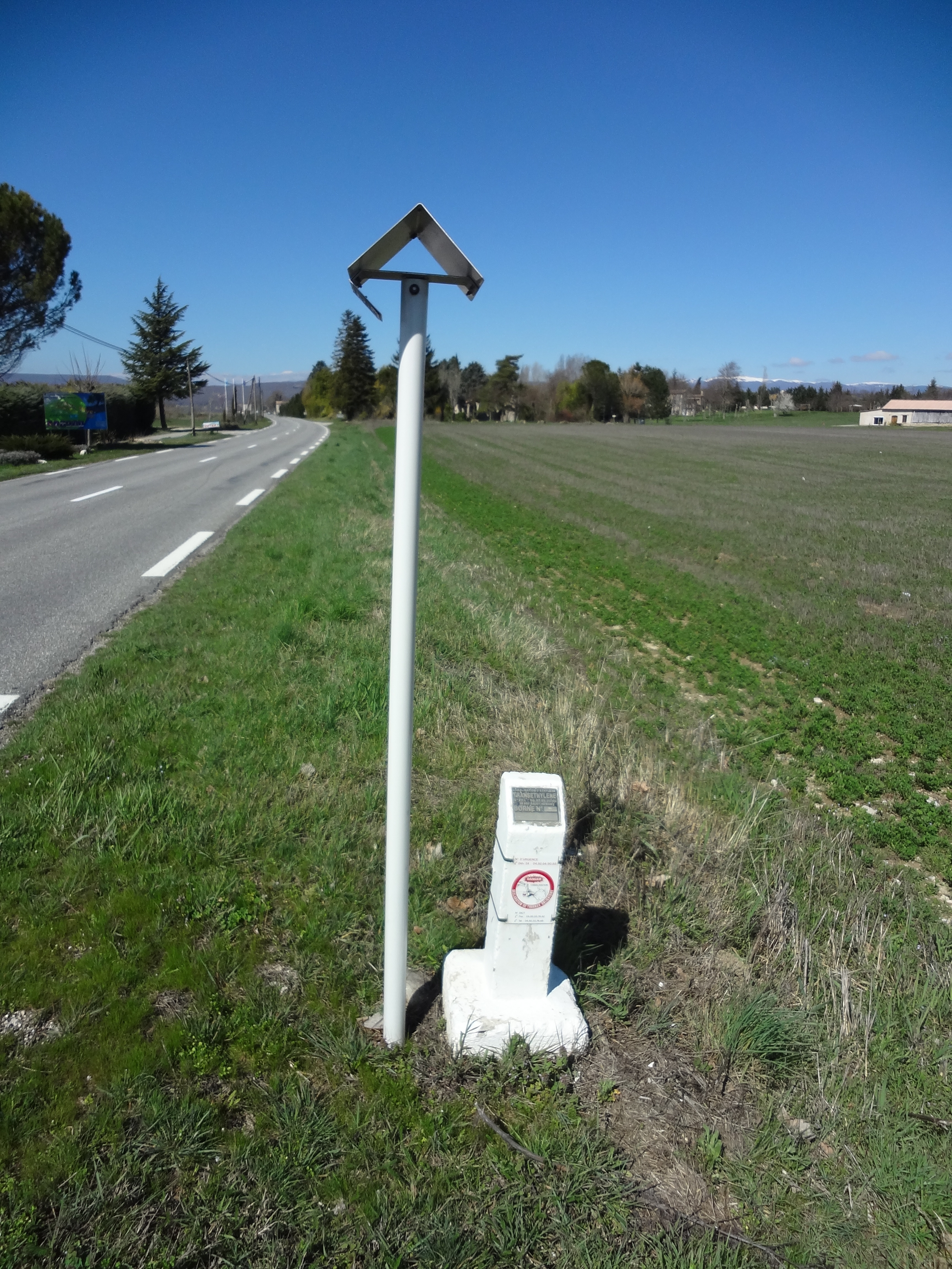 Potelet d’indication de la situation de la conduite Transéthylène, à Dauphin, face au camping l’Eau Vive